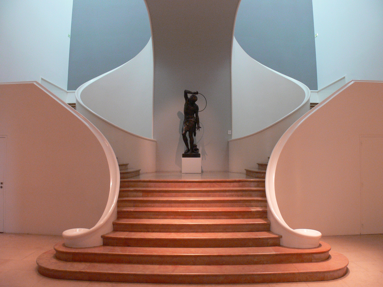 Escalier contemporain du Musée des Beaux-Arts de Nancy